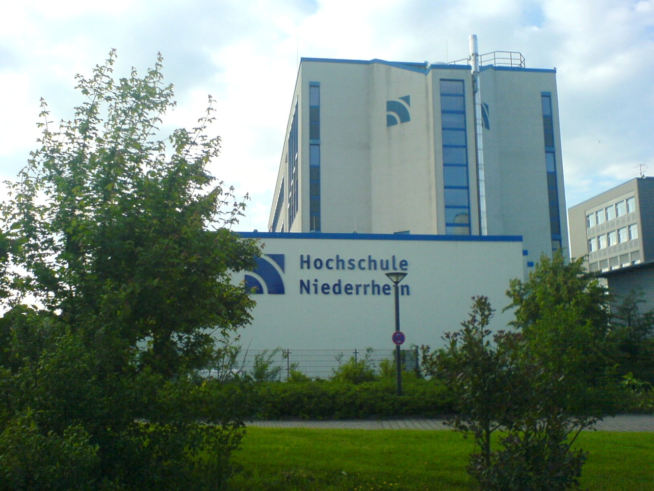 Hochschule Niederrhein, Krefeld